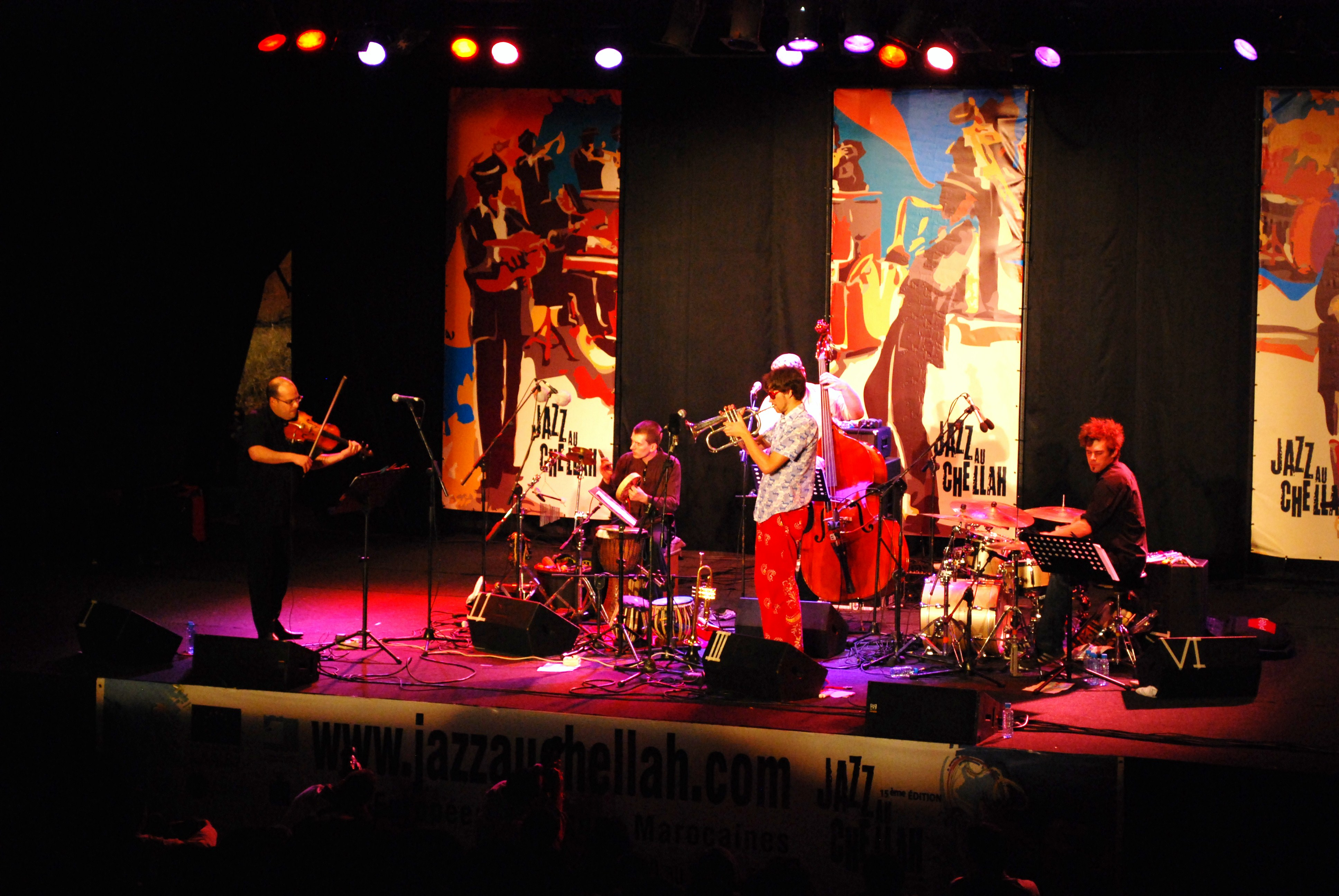 Jazz au Chellah, festival de jazz organisé chaque année en mois de juin à Rabat au Maroc